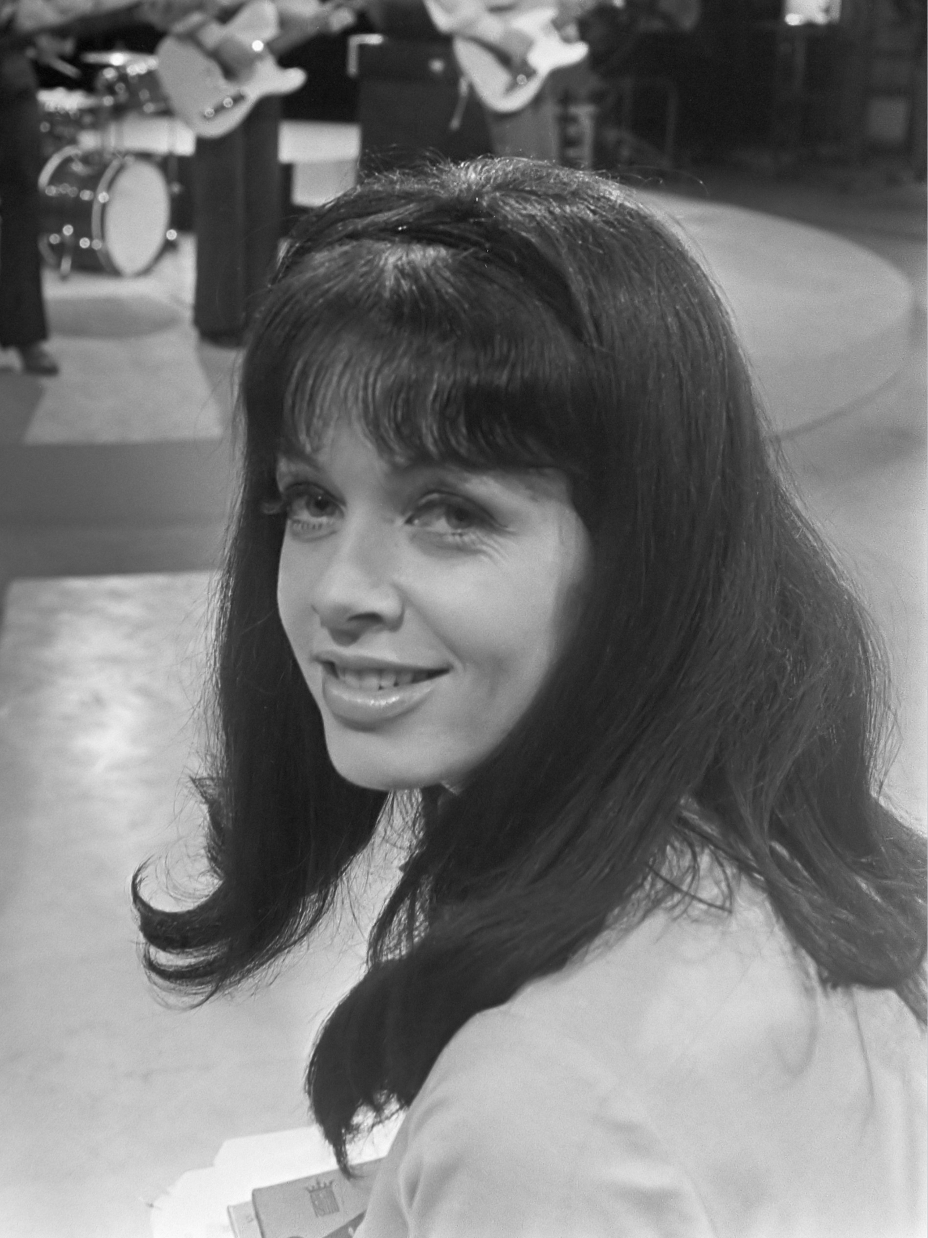 VARA TV programma's. Sonja Barend in programma Puntje puntje puntje, 13 augustus 1968